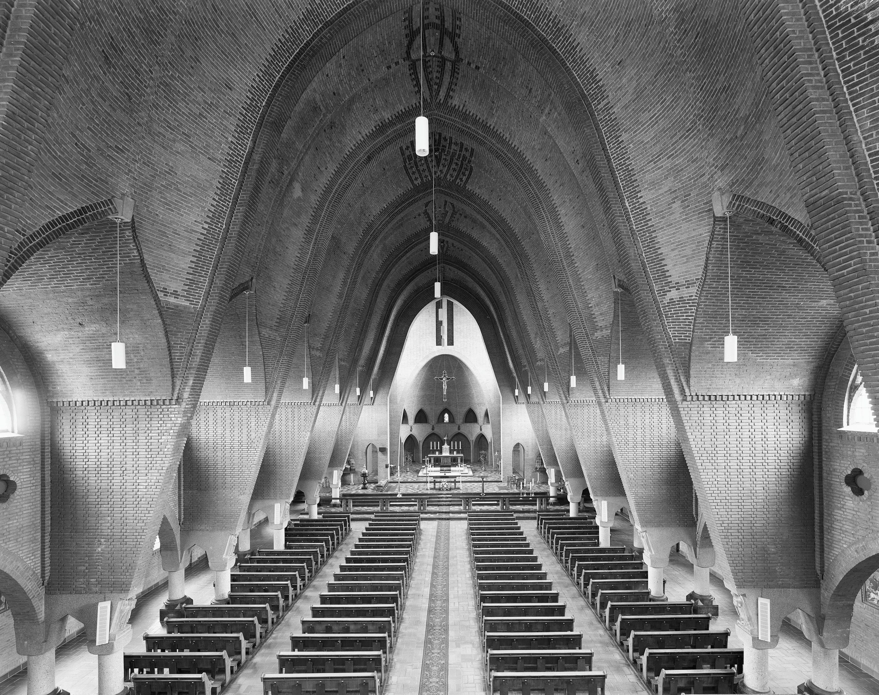 Rooms-Katholieke Kerk Van Onze Lieve Vrouwe Van Zeven Smarten: Int. overzicht naar het altaar